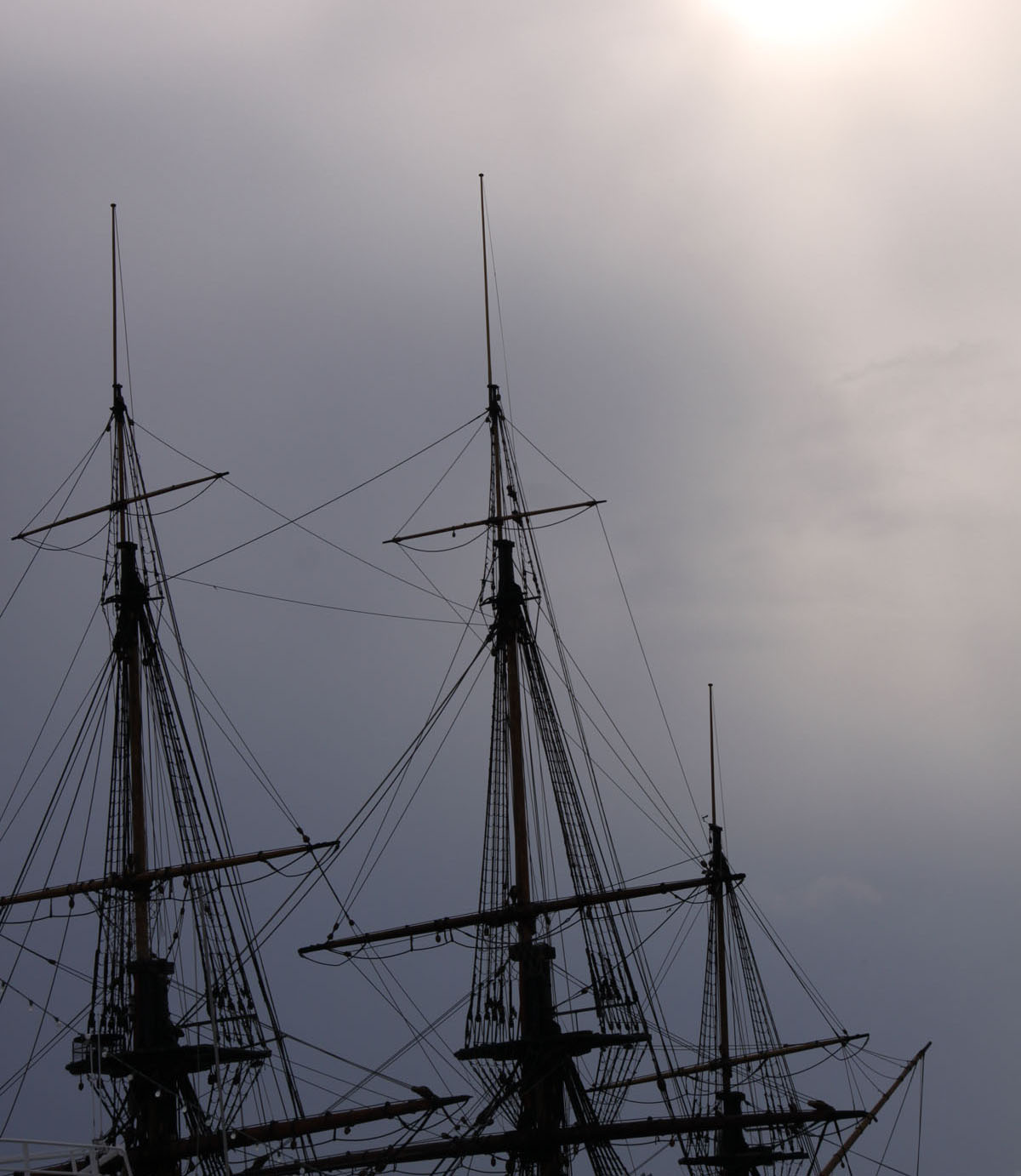 Götheborg (ostindiefararen) och dess master